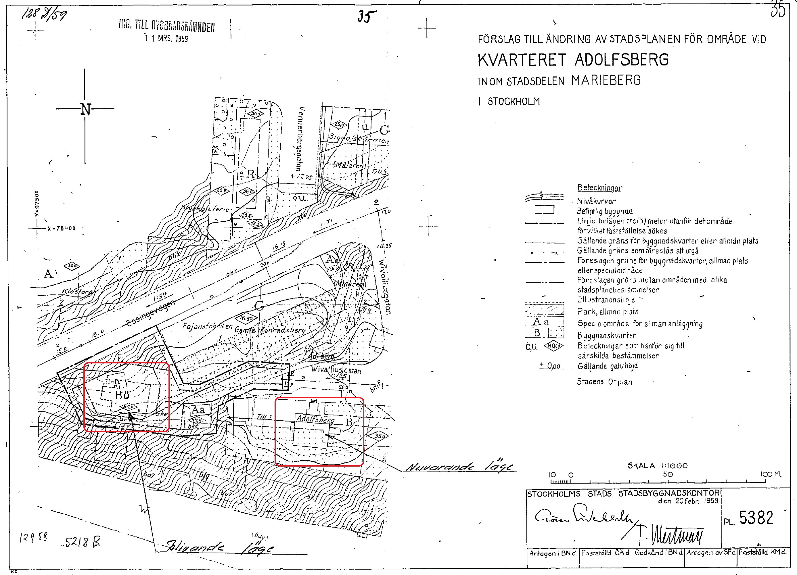 Stadsplan för kvarteret Adolfsberg